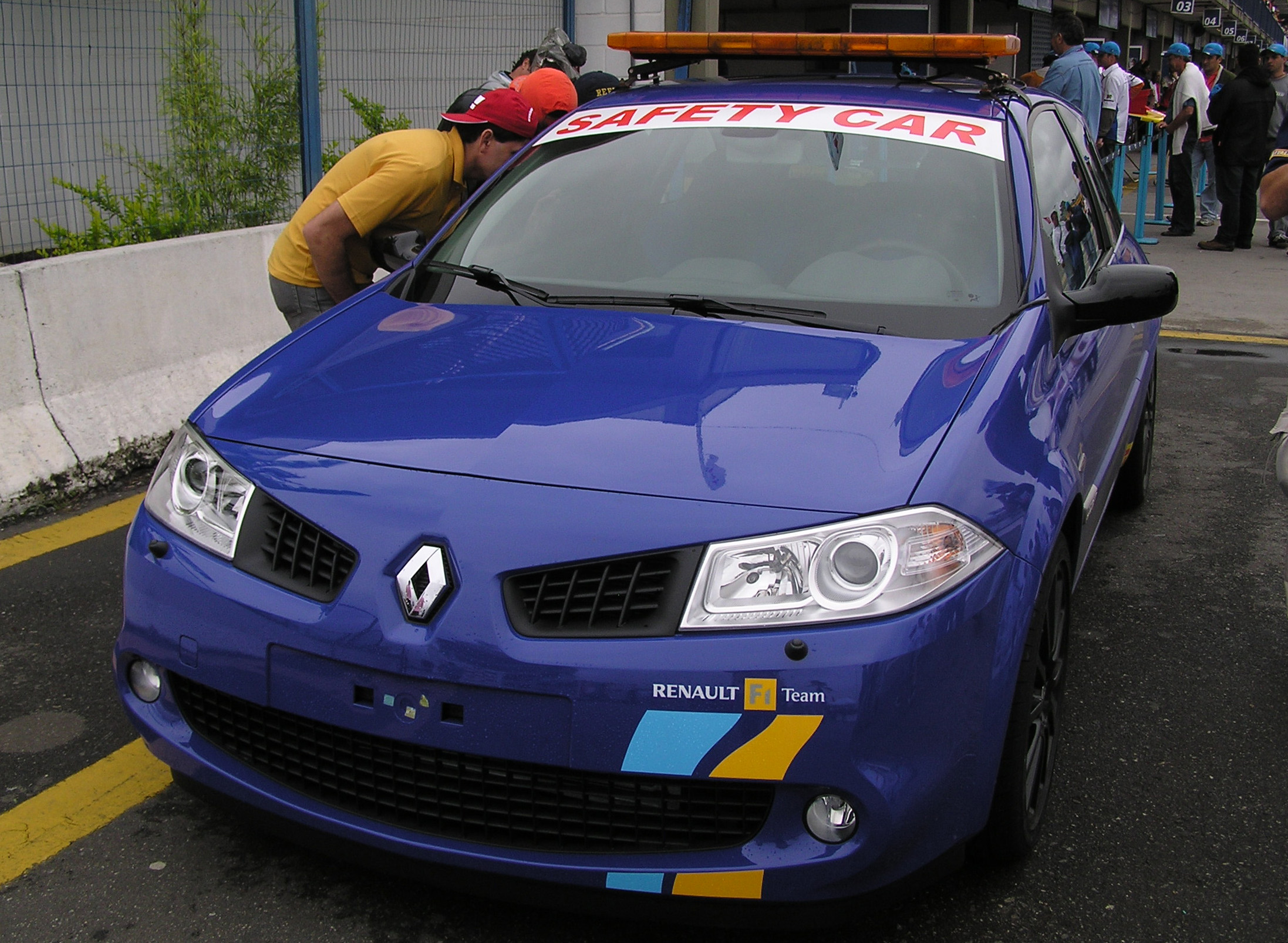 Formula Renault Safety Car: Renault Megane